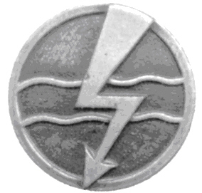 Własna praca Kwz